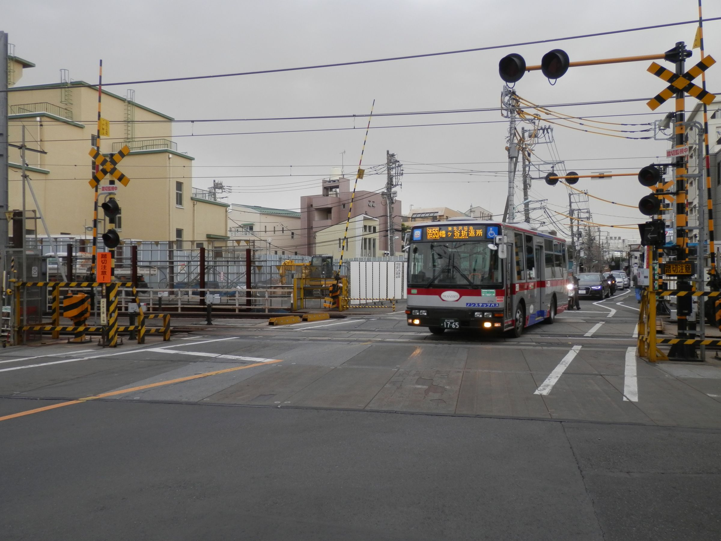 Tokyu Bus 東急バス